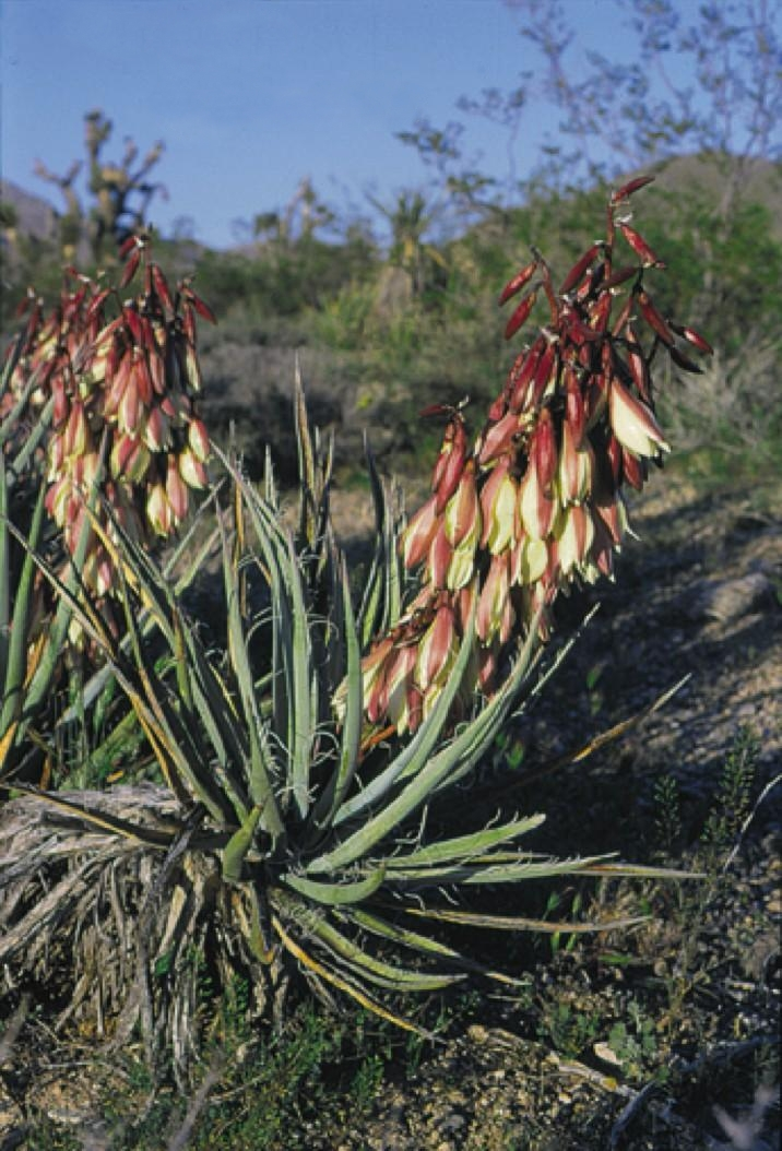 Yucca baccata subsp. vespertina